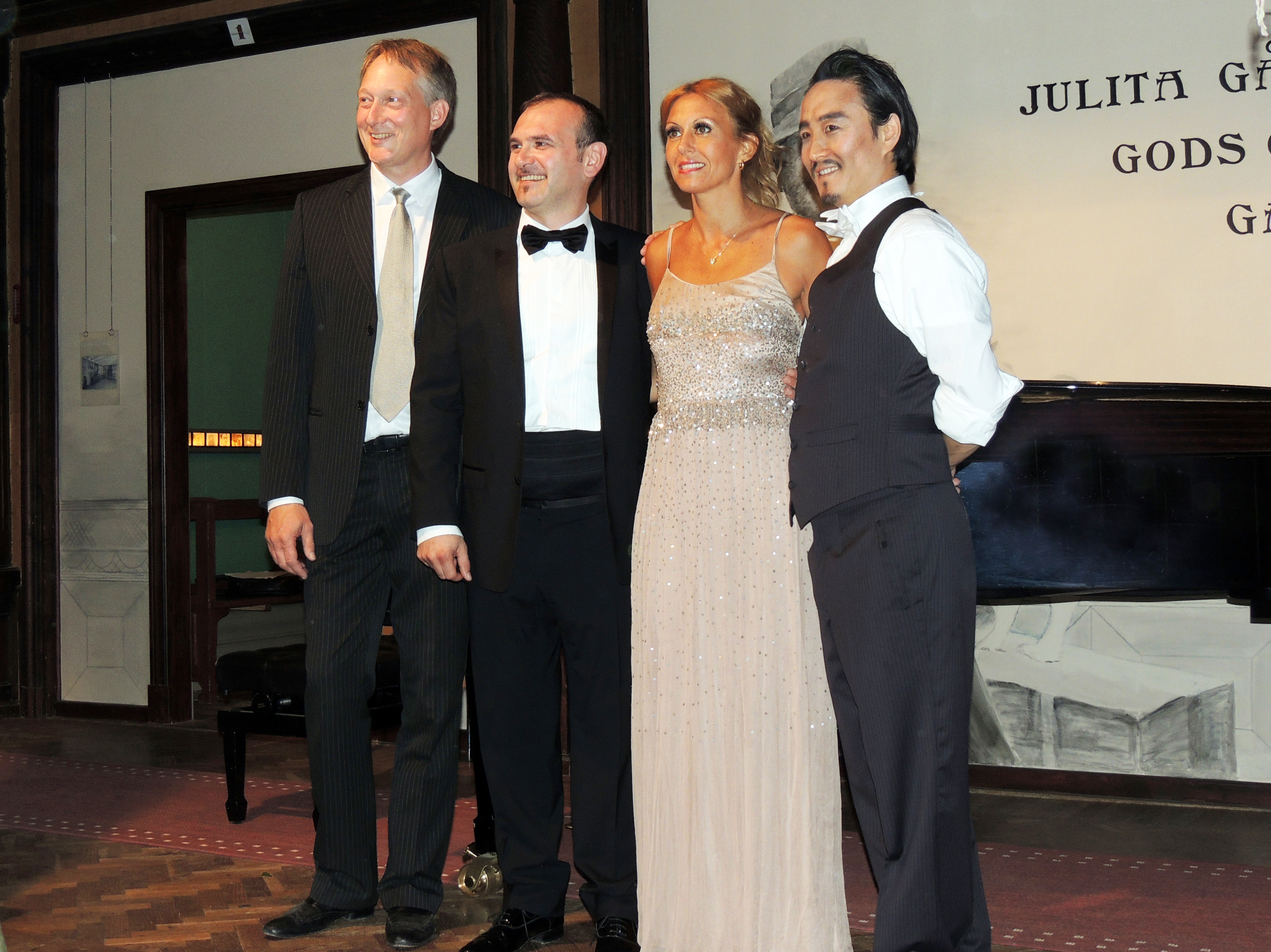 Carl Pontén (piano), Angelo Villari (tenor), Raffaella Battistini (sopran) och Matteo Suk (baryton) vid den 20:e Julitafestivalen 21 juli 2013.